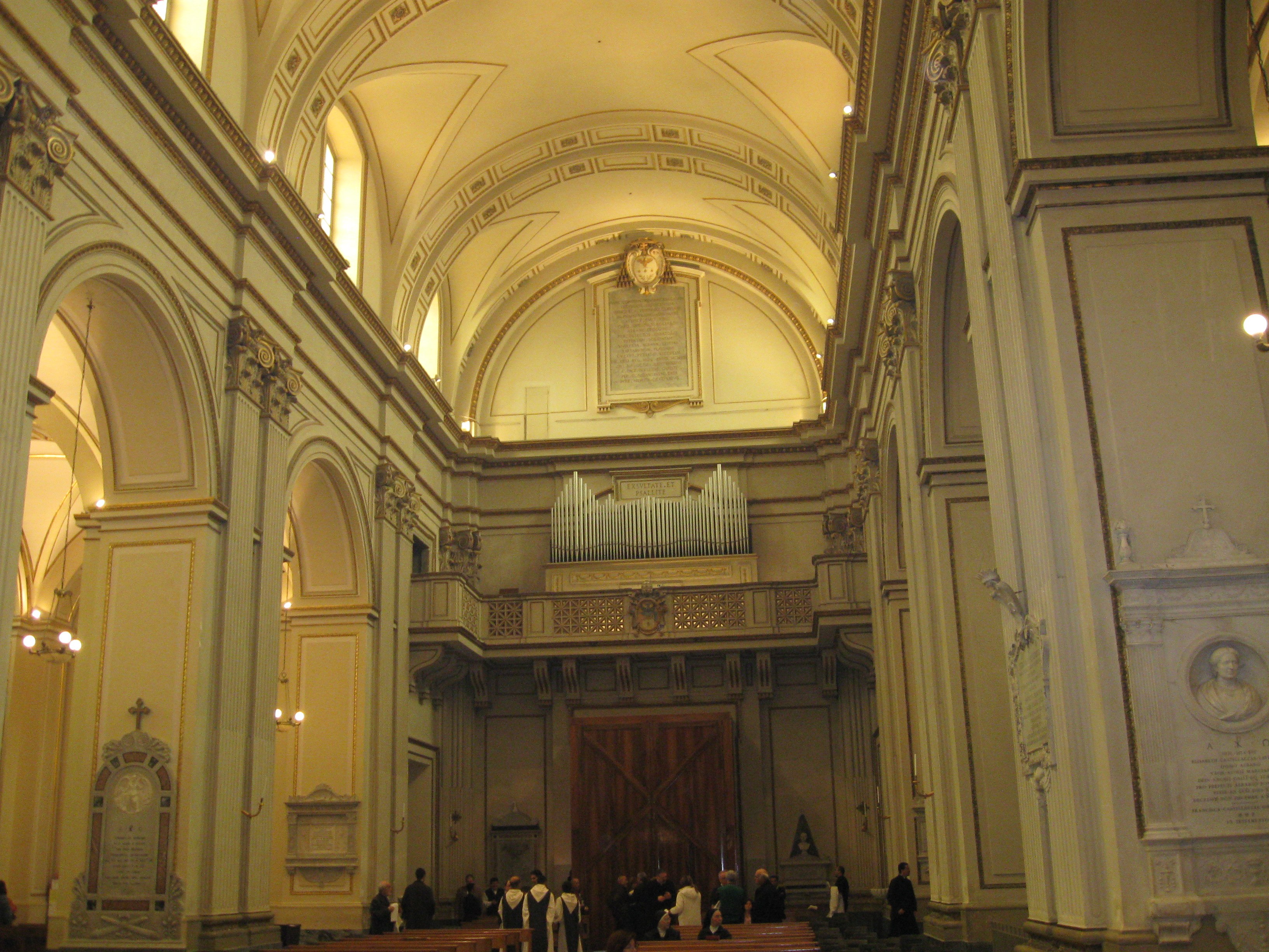 Interno cattedrale di Albano (RM)